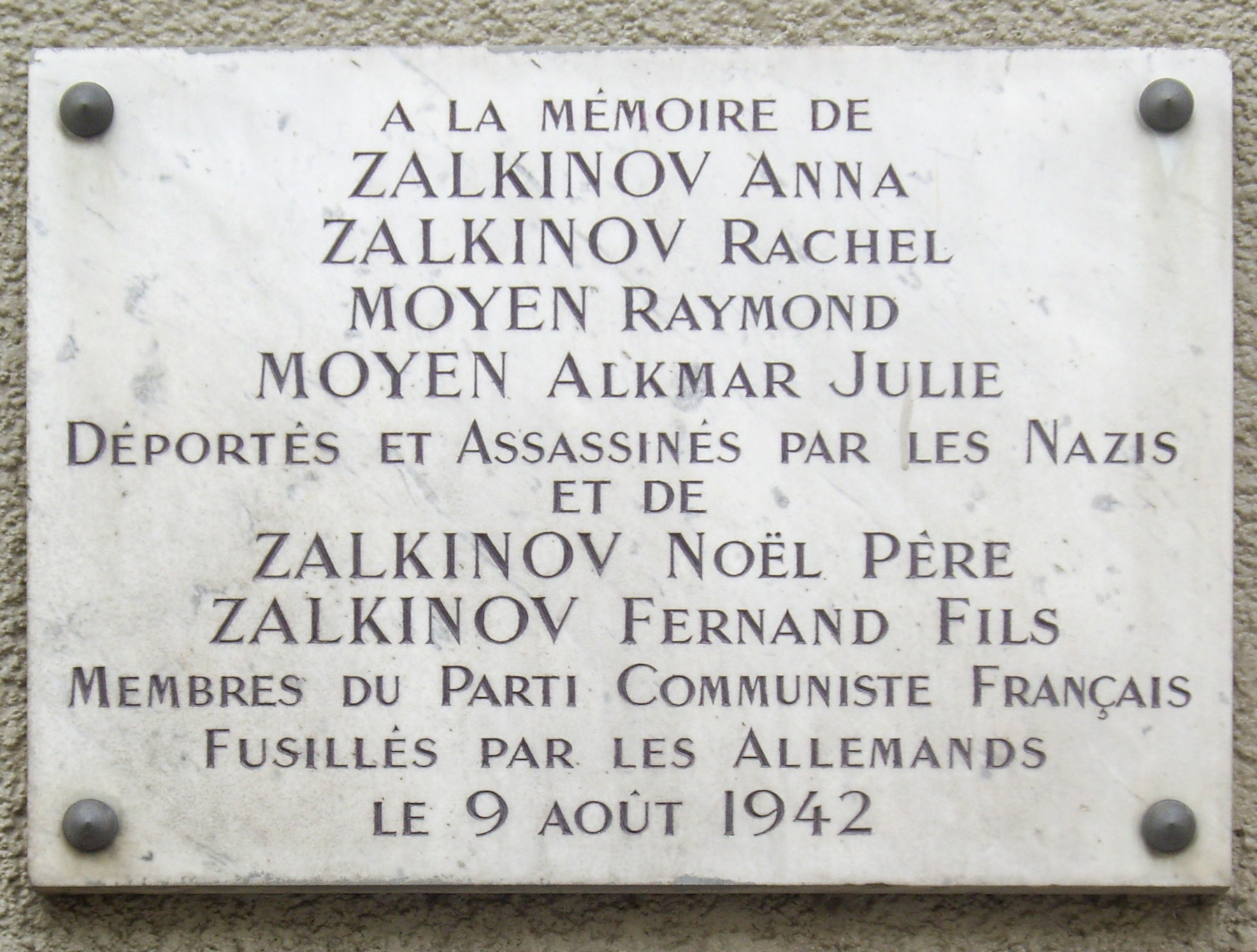 Plaque commémorative, 73 rue des Amandiers, Paris 20e. « À la mémoire de Zalkinov Anna, Zalkinov Rachel, Moyen Raymond, Moyen Alkmar Julie, déportés et assassinés par les nazis, et de Zalkinov Noël, père, Zalkinov Fernand, fils, membres du Parti communiste français, fusillés par les Allemands le 9 août 1942. » Quelques erreurs sur la plaque [1] : Juliette Moyen est née Zalkinow et non Alkmar Julie ; La date du 9 août 1942 est fausse. Fernand Zalkinow est fusillé au Mont Valérien le 9 mars 1942 et Noël Zalkinow, son père le 11 août 1942, également au Mont-Valérien ; Le N° 73 ne correspond pas à l'adresse des membres de la famille Zalnikow (avec un W et non un V), qui est indiquée au 51 rue des Amandiers (sources Mémorial de la Shoah / documents allemands).